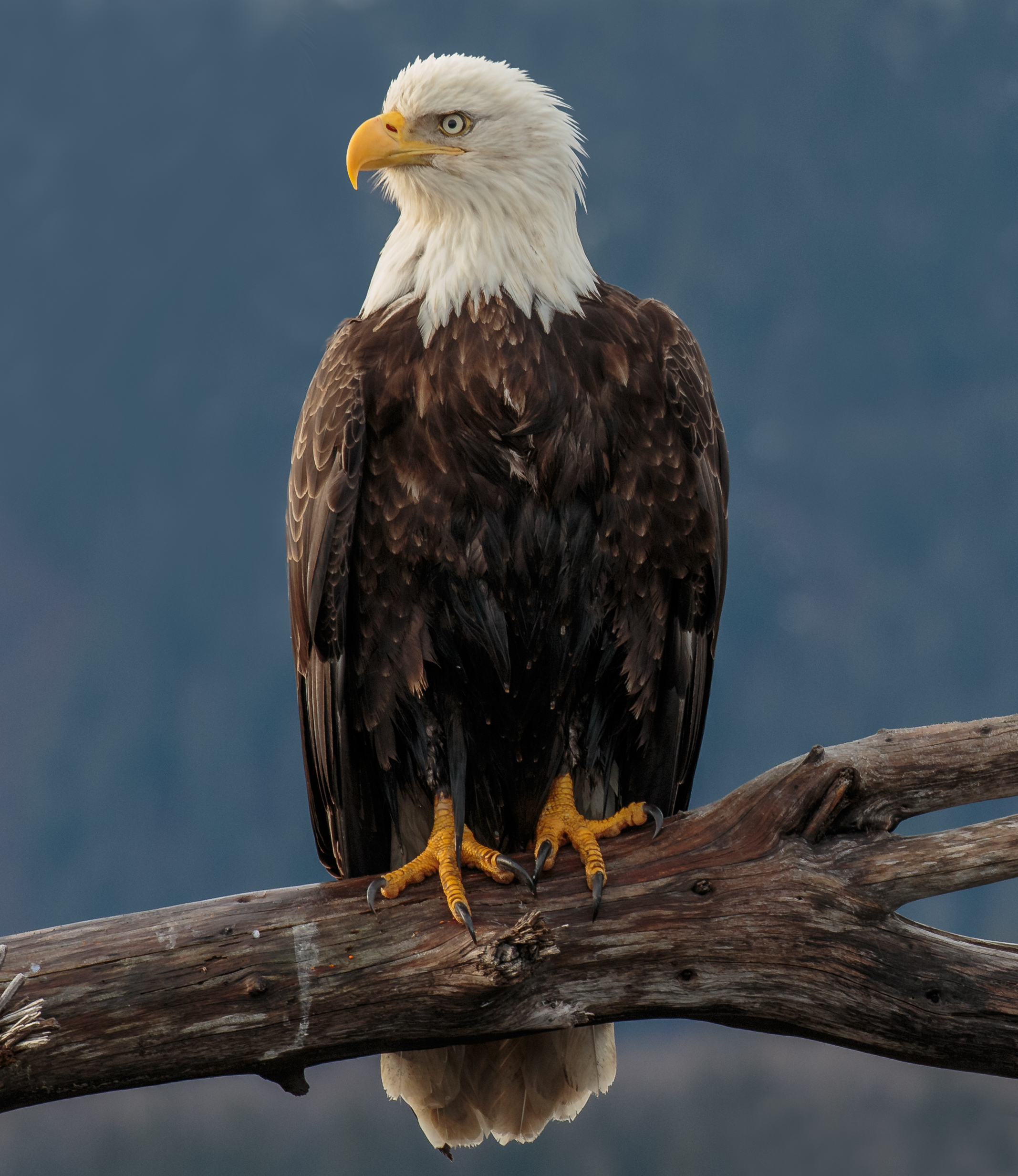 Taken in Alaska.